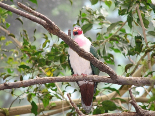 Jambu Fruit Dove